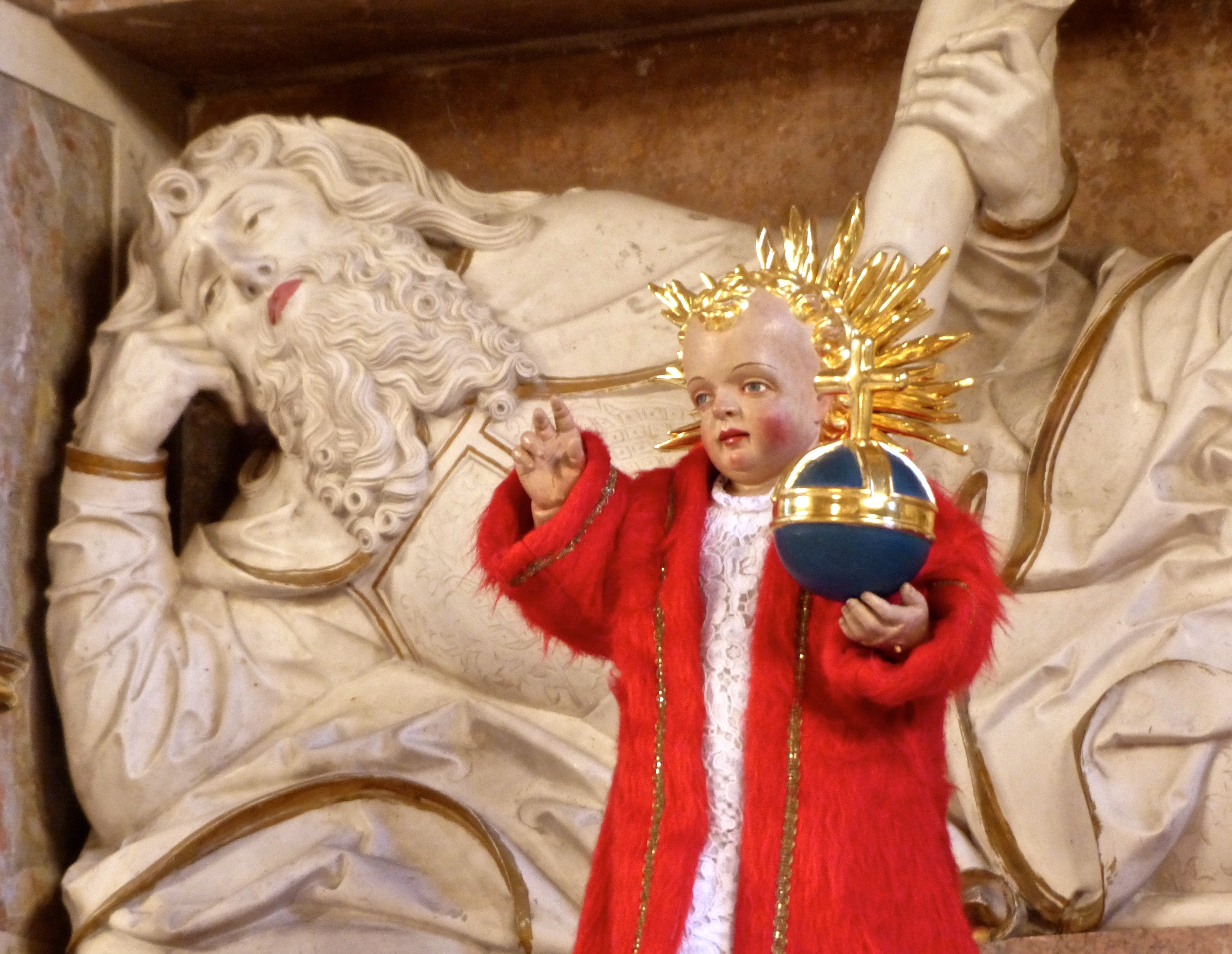 St. Annen: Bornkinnel